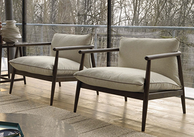 KARIN